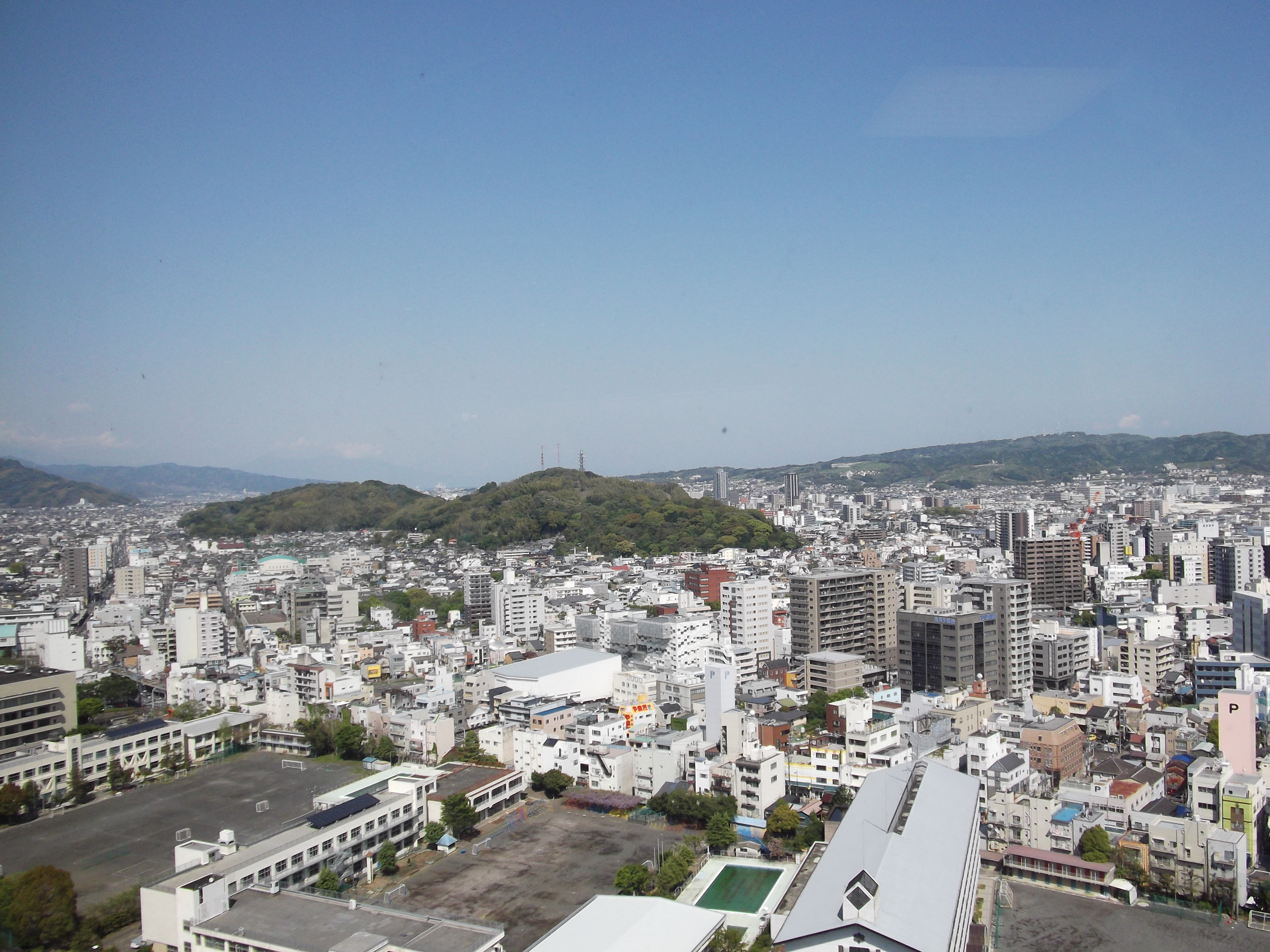 静岡平野にある谷津山を静岡県庁２１階展望デッキから